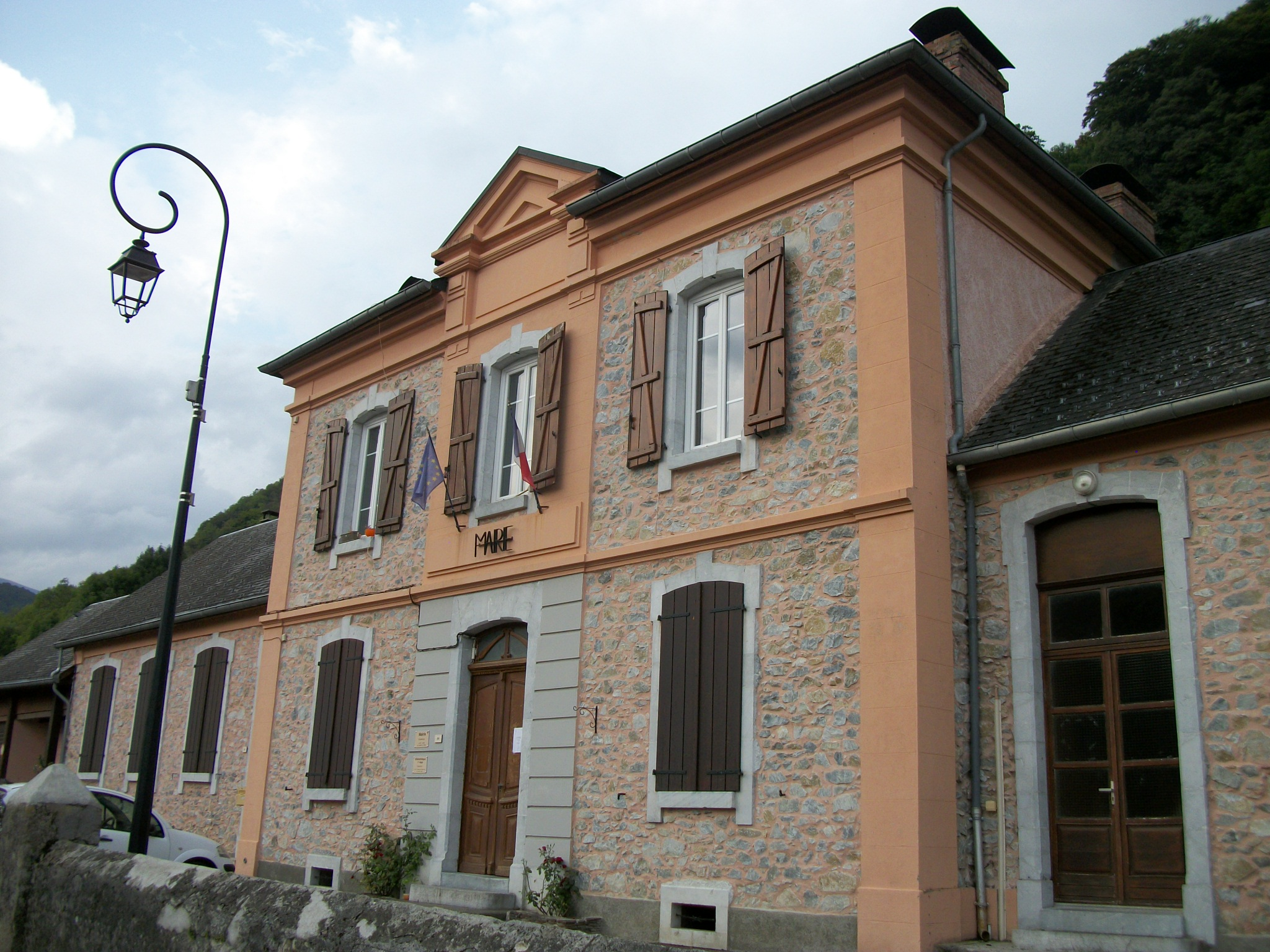 La mairie